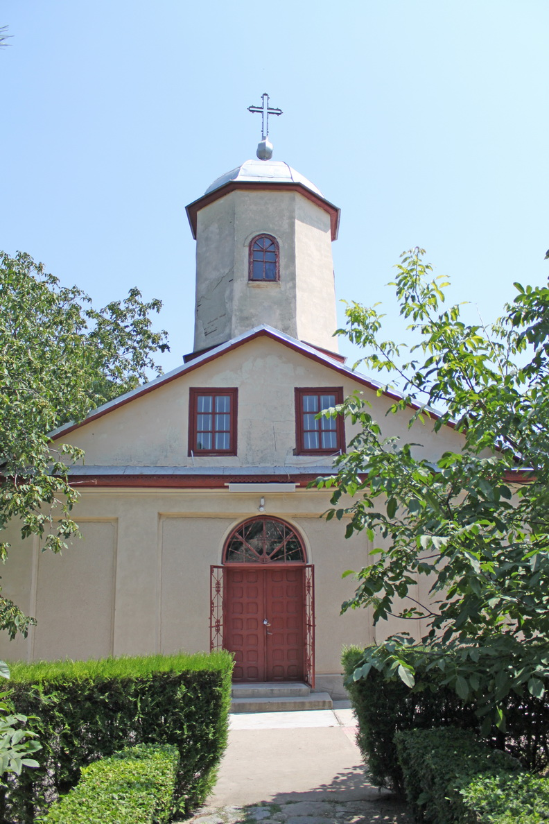 Biserica de lemn de la Mănăstirea Saon, judeţul Tulcea.